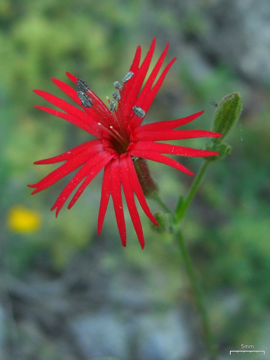 Silene laciniata 20100621.17 Mount Wilson, San Gabriels, so. CA